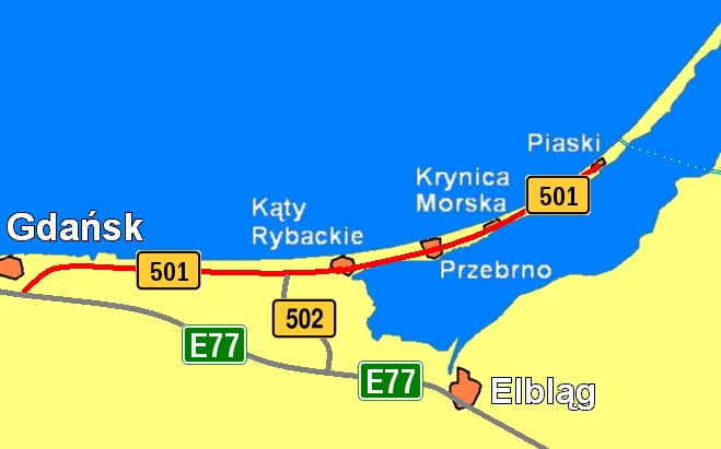 Droga wojewódzka 501 (Poland) - map